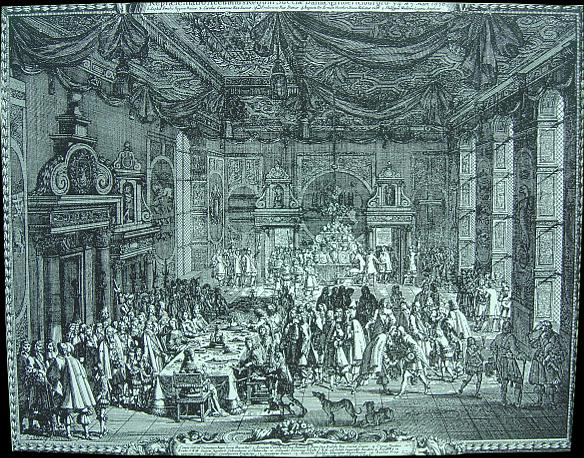 18. februar 1658 førtes forhandlingerne i Høje Taastrup Præstegaard, og 26. februar 1658 underskrives Freden i Roskilde, hvorunder Frederik III. (regent 1648-1670) afstod Skåne, Halland, Blekinge, Bohus len og Trondhjem len til Karl X. Gustav. Efter selve fredsunderskrivelsen afholdt Fred. III. 3. marts 1658 et fredstaffel for Karl X Gustav på Frederiksborg Slot. Det er dette taffel der er gengivet ovenfor. Taflet foregik i Englesalen (den nuværende stue 37), der var udsmykket med silketæpper og afbildninger af våbenskjoldene for de forskellige dele af det danske monarki. Til venstre ses opgangen til Riddersalen. Totalt ydmyget sidder Dronning Sophie Amalie af Braunschweig-Lüneburg for bordenden mod læseren. Til sin højre side har hun Karl X. Gustav, efterfulgt af Kong Frederik III. Prominent placeret i midten af dette kobberstik ser vi Frederik III’s Danske Hunde. Stikket er spejlvendt og udført efter tegning af Erik Dahlberg.